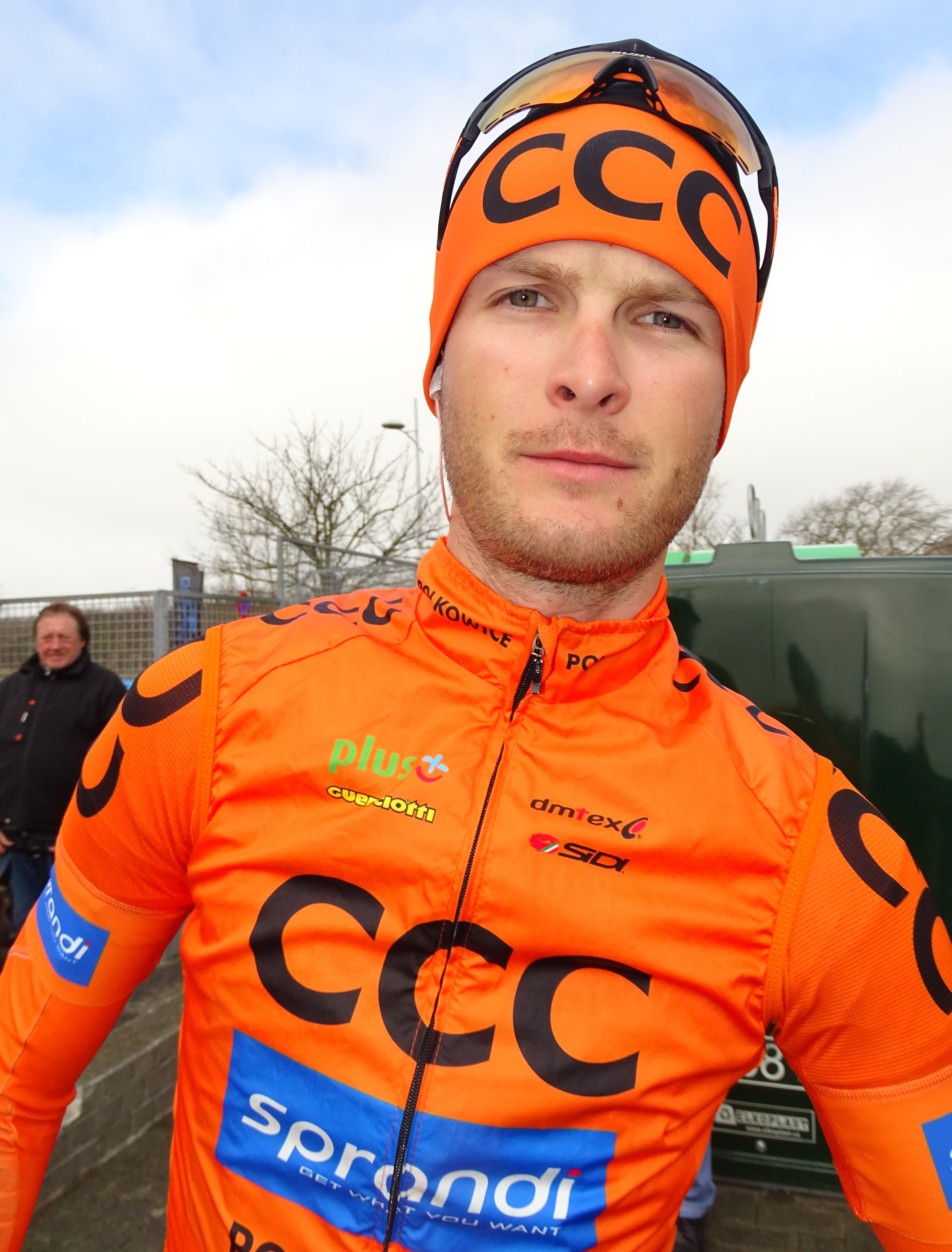 Reportage réalisé le vendredi 18 mars à l'occasion du départ de la Handzame Classic 2016 à Bredene, Belgique.